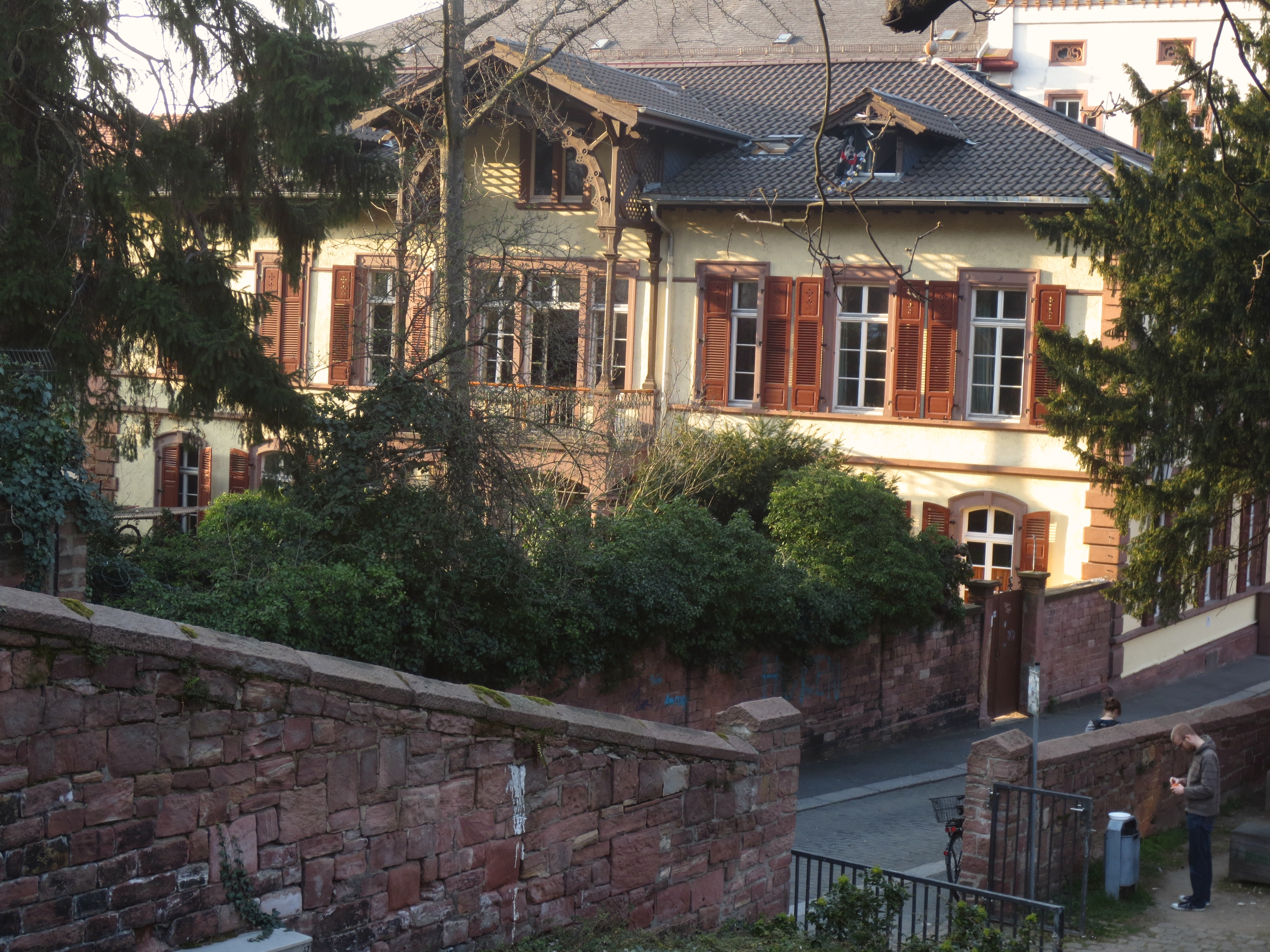 II. Heidelberg Altstadt Campus Universität Heidelberg Johann Kaspar Bluntschli Wohnhaus